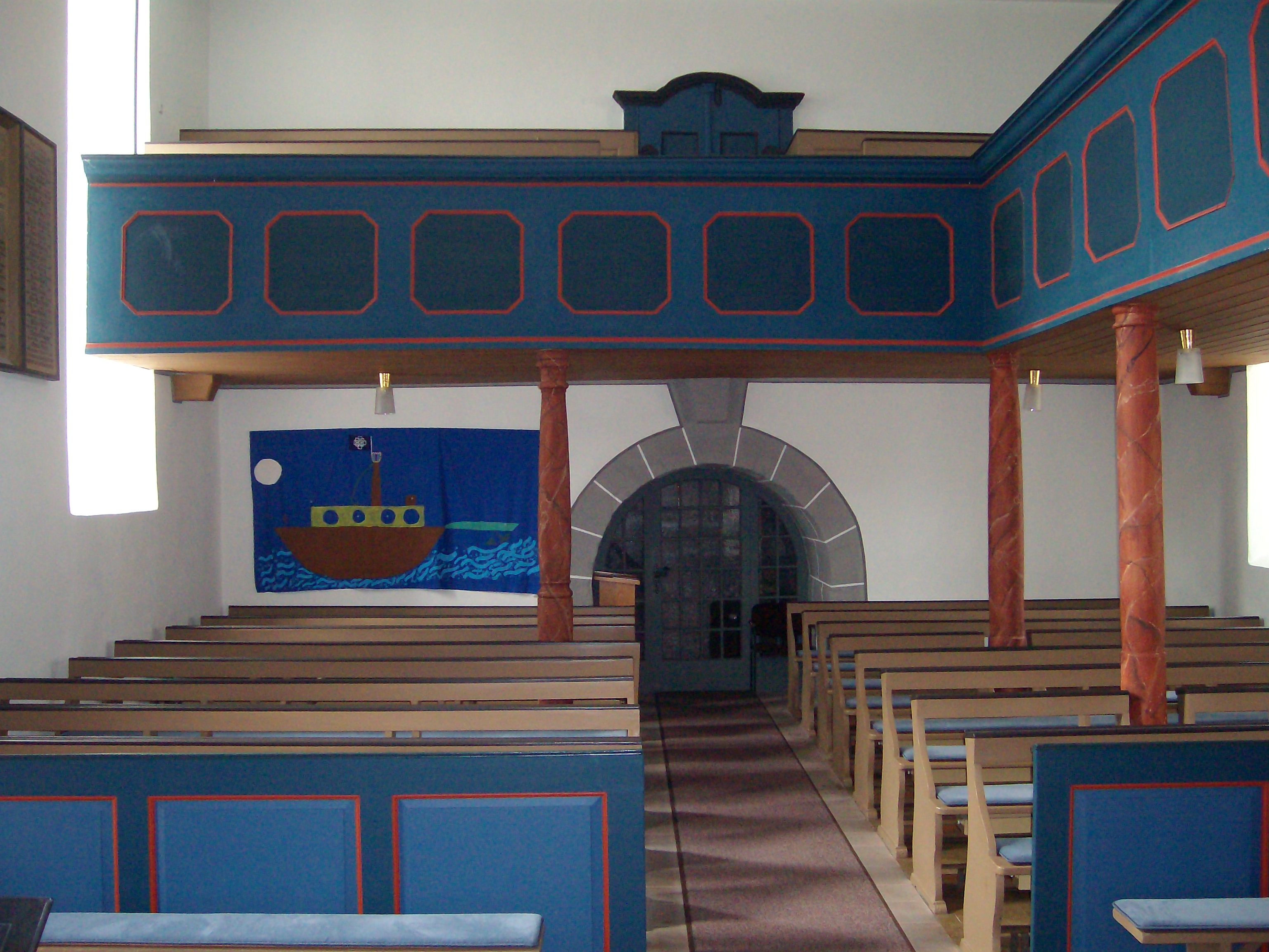 Innenraum der Evangelischen Kirche in Kirch-Göns, Hessen